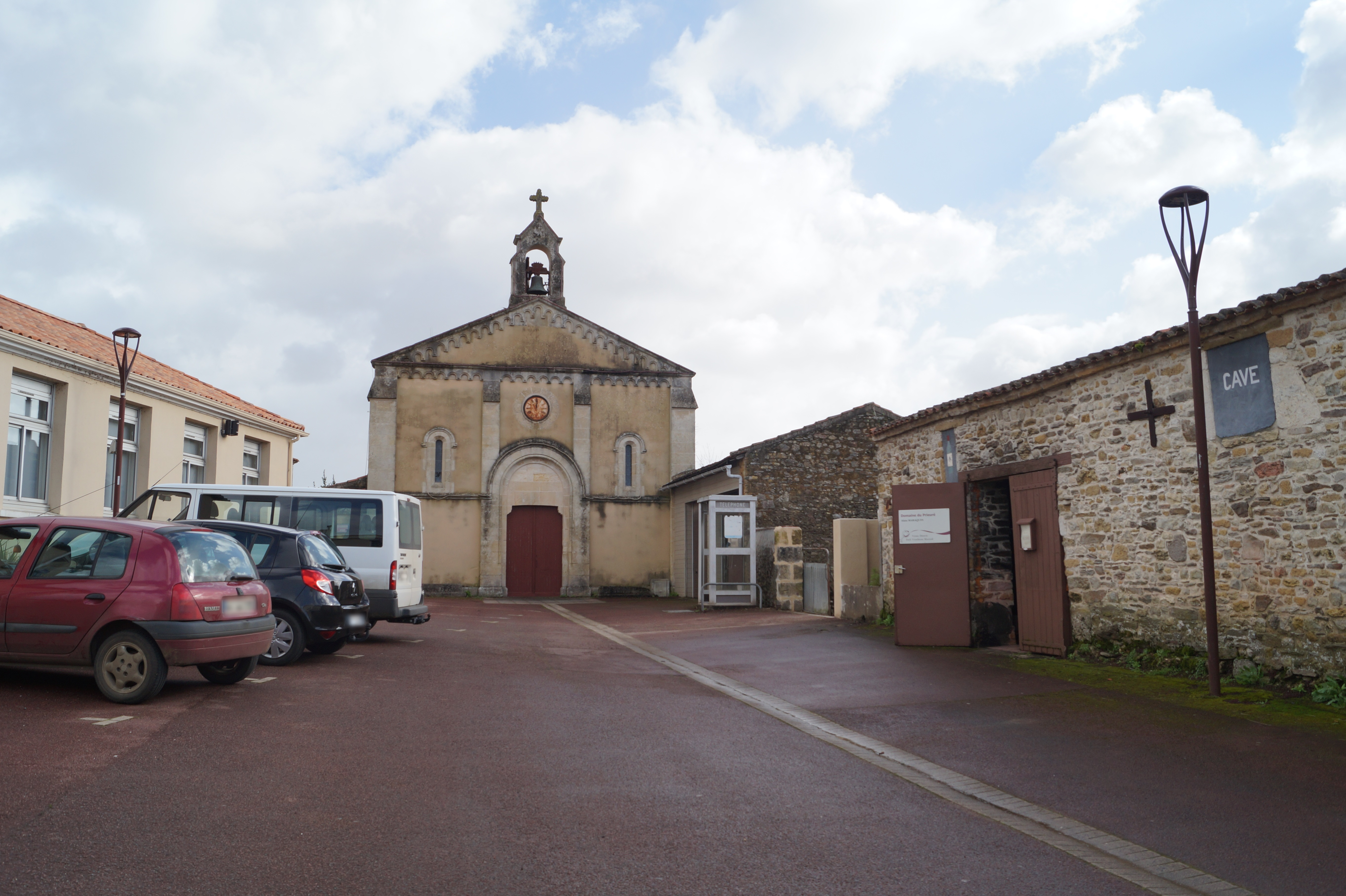 L’église Notre-Dame-de-l’Assomption de La Couture depuis la rue de la Bergerie.